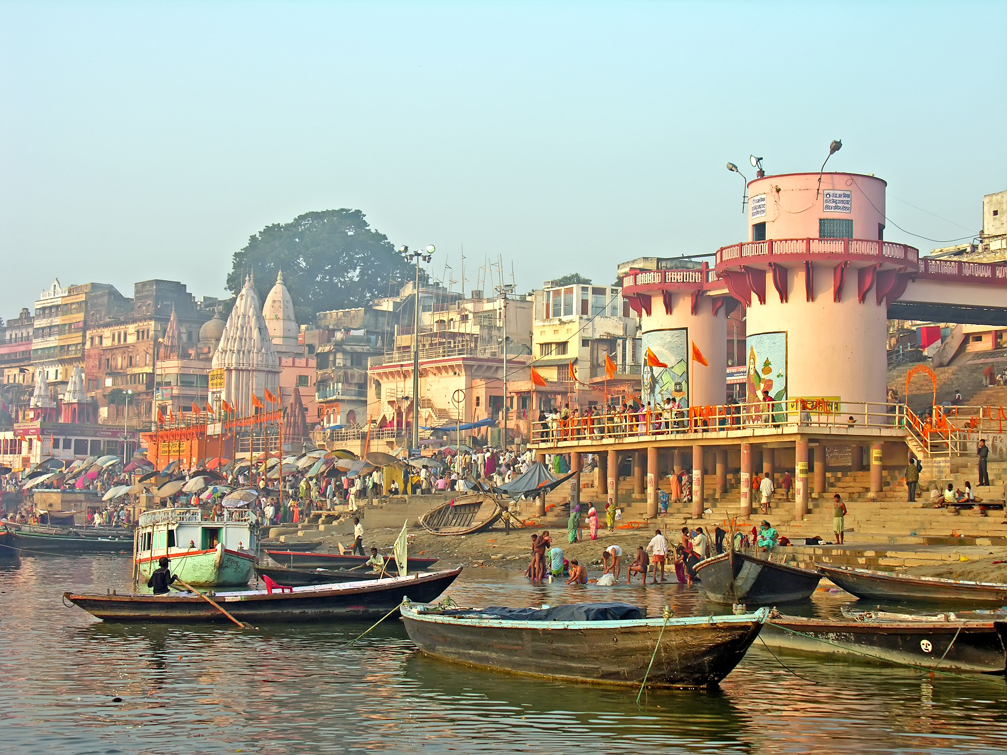 India-5391